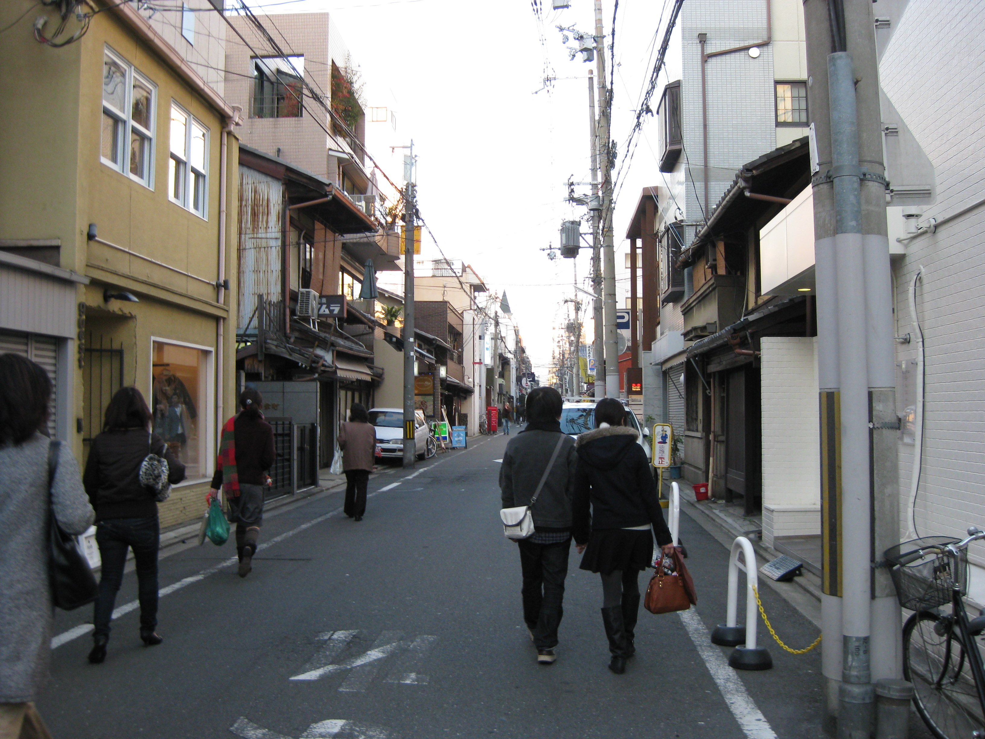 御幸町通。蛸薬師通より北方向